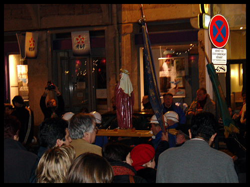 Fête de la St barbe à Saint Étienne